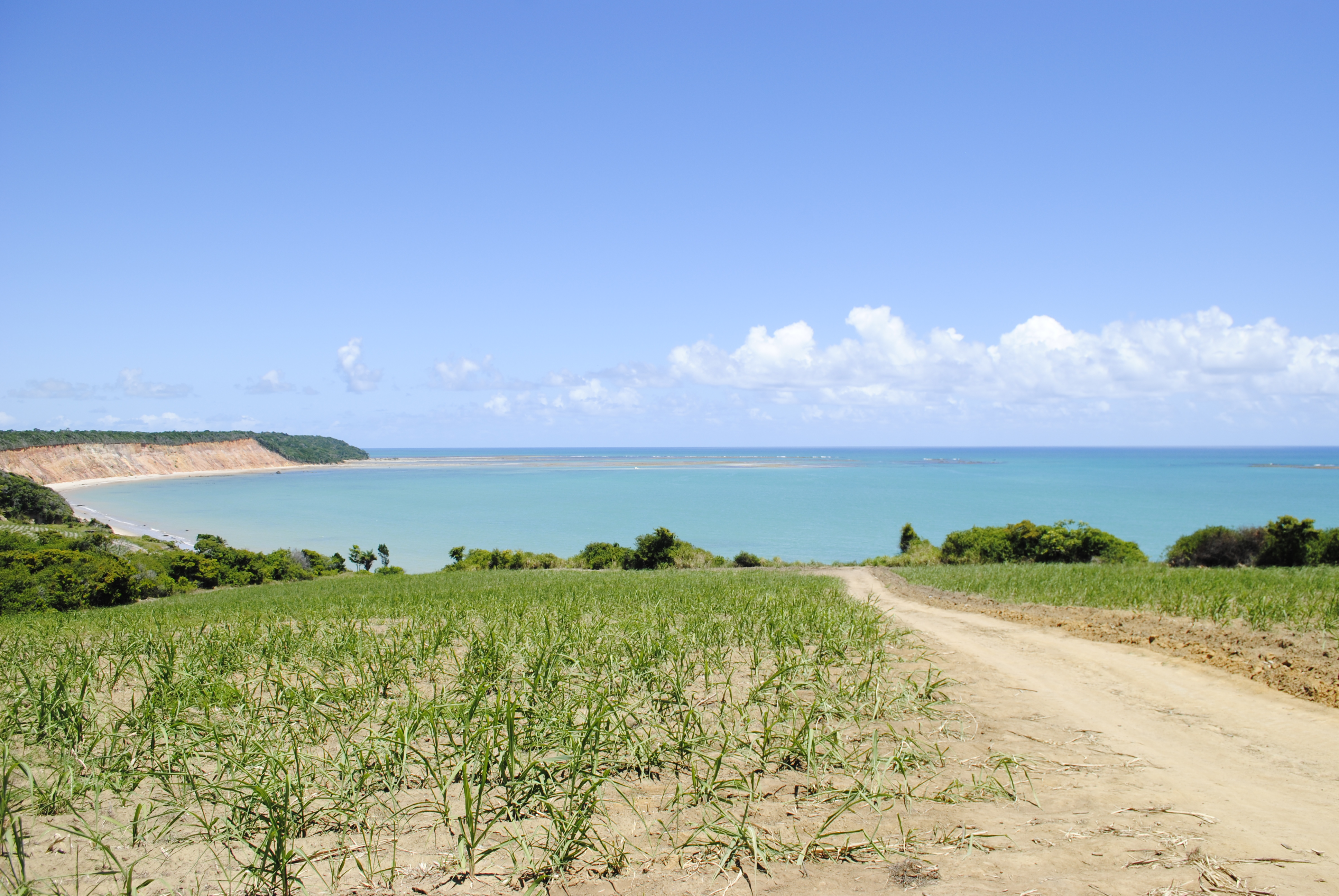 Praia de Carro Quebrado (04-01-2014) 108